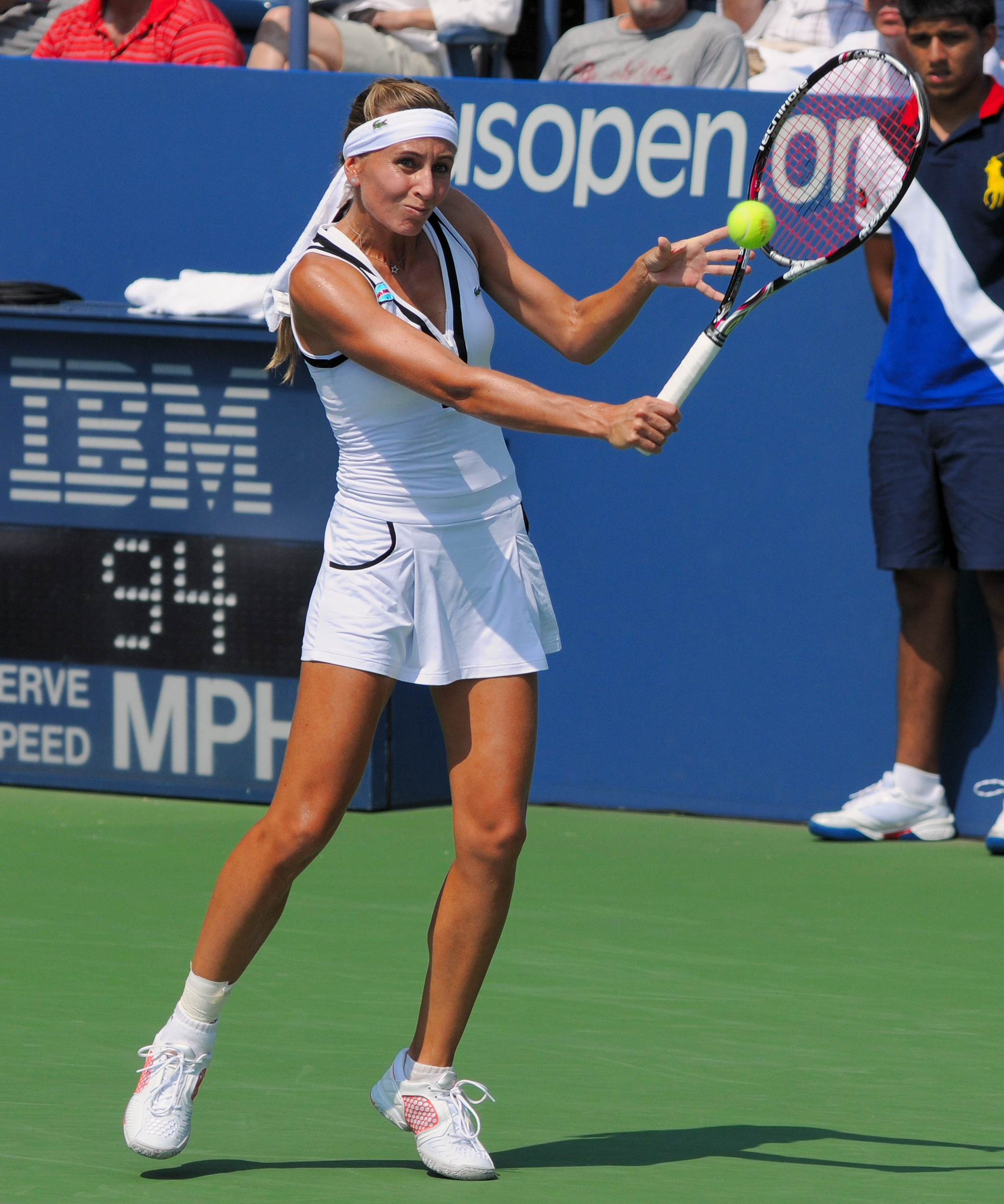 Gisela Dulko - US Open 2010